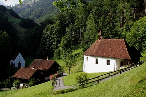 Flüeli-Ranft: Obere Ranft-Kapelle mit rechts angebauter Klause von Bruder Klaus